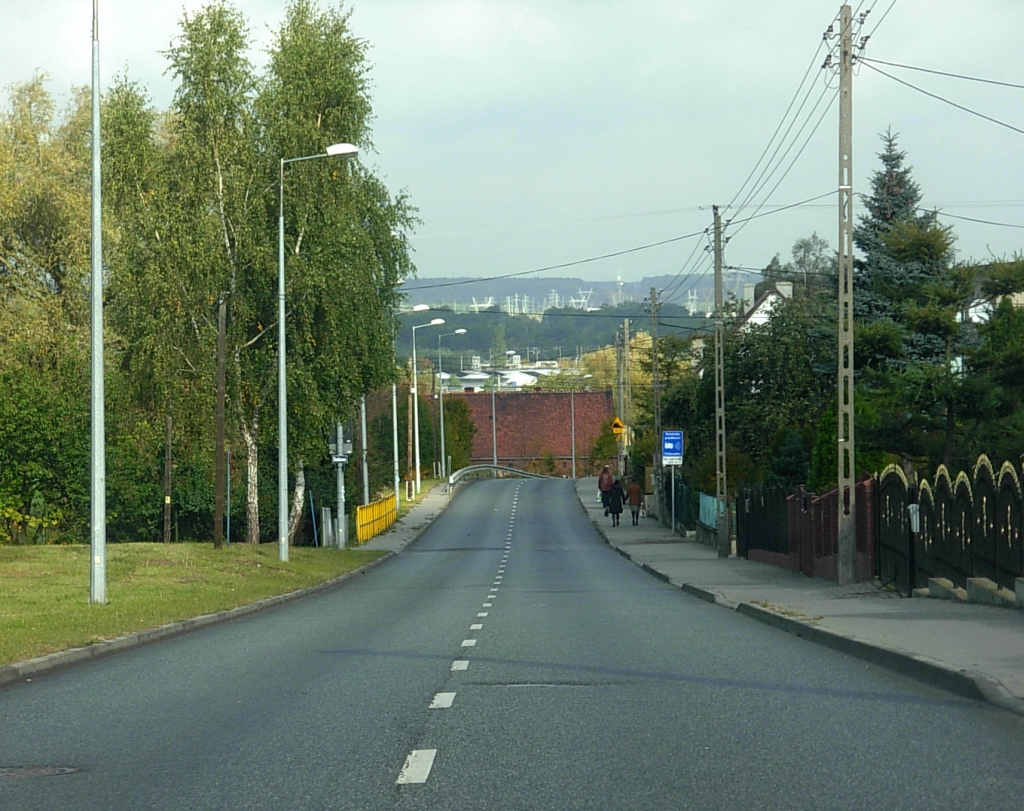 Ulica Hutnicza w Bydgoszczy